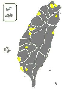 Taiwan map in 1945 接管台灣行政區劃省轄市